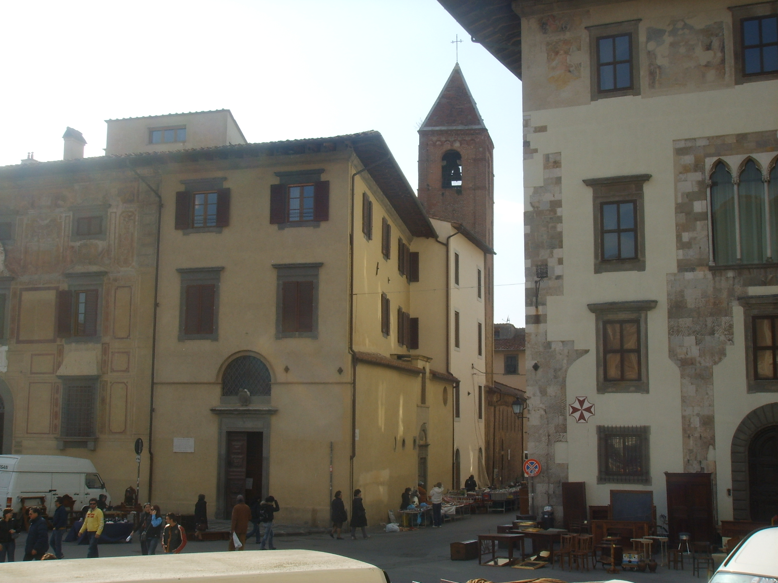 Chiesa di san rocco, Pisa: esterno.